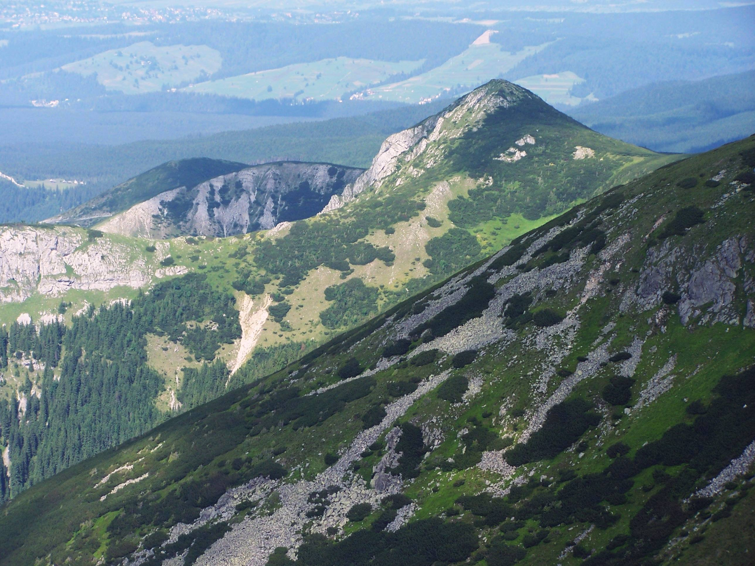 Kopa Magury (Tatra Mountains)